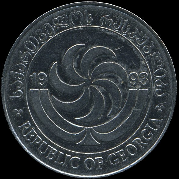 20 Georgian tetri (Obverse)